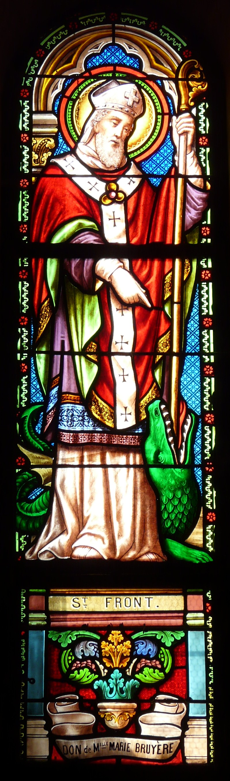 Vitrail représentant saint Front, nef de l'église Saint-Germain-de-Paris, Saint-Germain-de-Belvès, Dordogne, France.